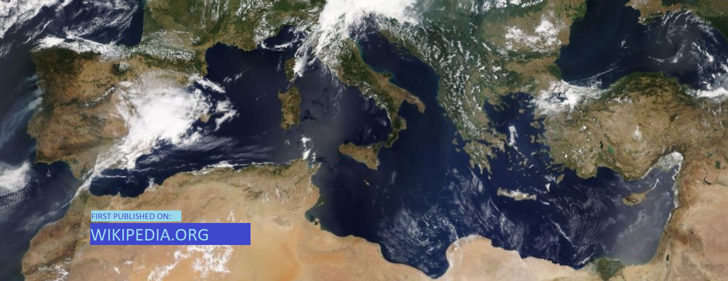 Μεσσόγειος